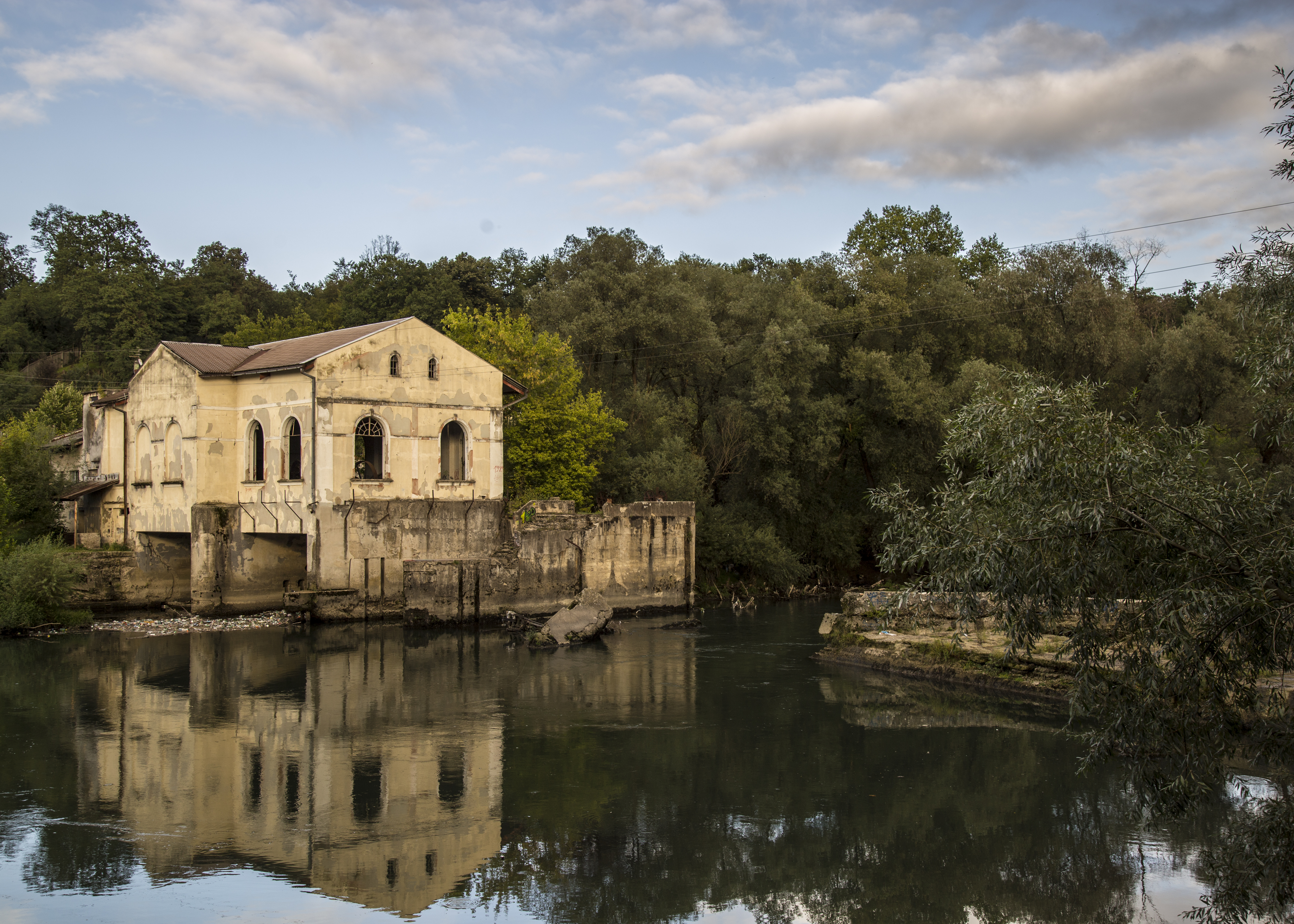 Електрана у Делибашином селу, Бања Лука ID добра: NKD021 Електрана у Делибашином селу